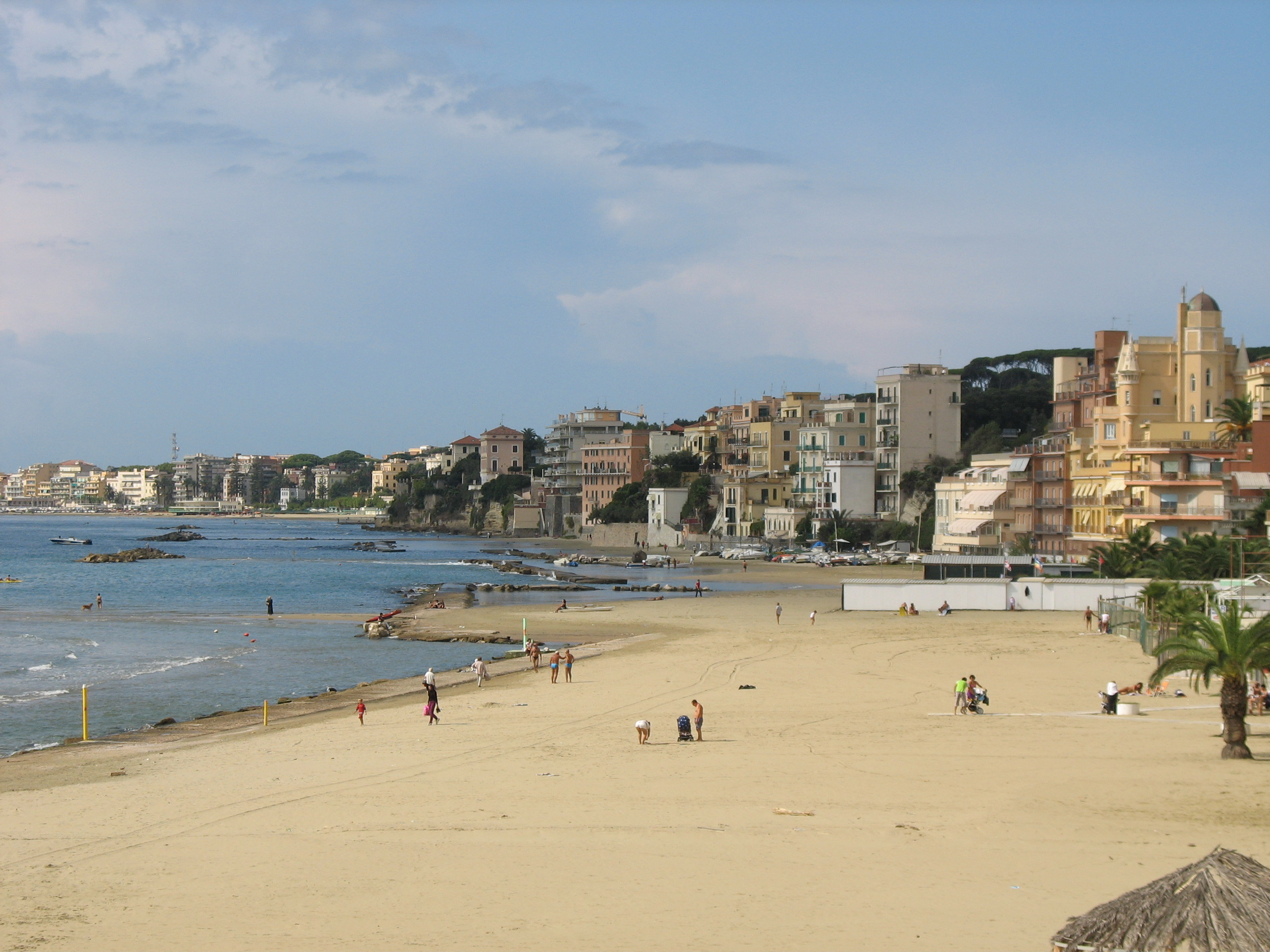 stefano, foto mie, foto città, gfdl